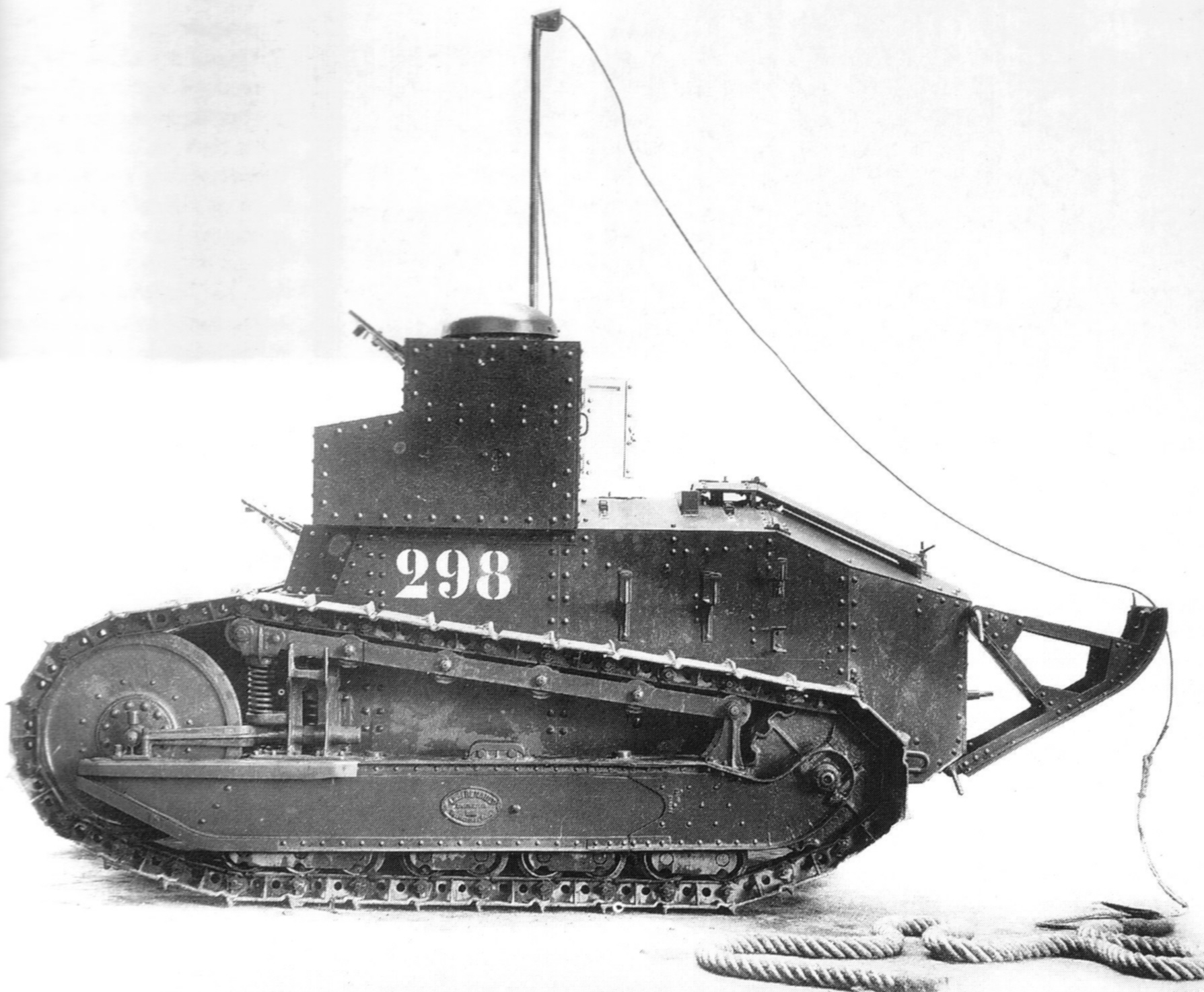 Digitale reproductie foto van het eerste productievoertuig van de FT-17 TSF tank